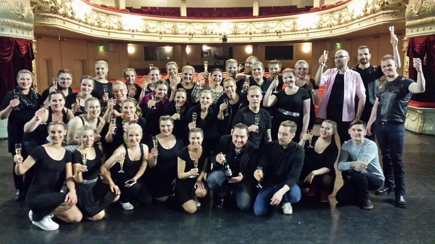 Aventur-showkuoro Aleksanterin teatterissa 7!-shown päättävän konsertin jälkeisissä tunnelmissa huhtikuussa 2017.